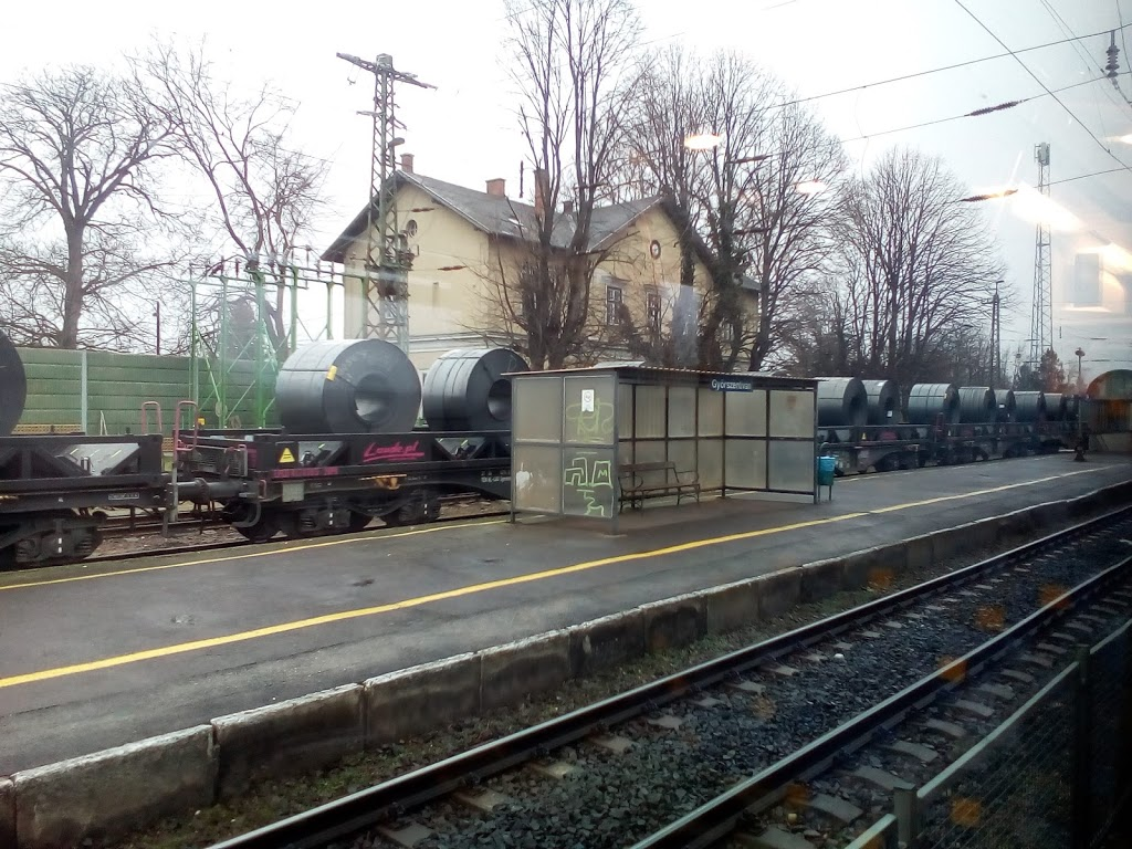 Győrszentiván vasútállomás